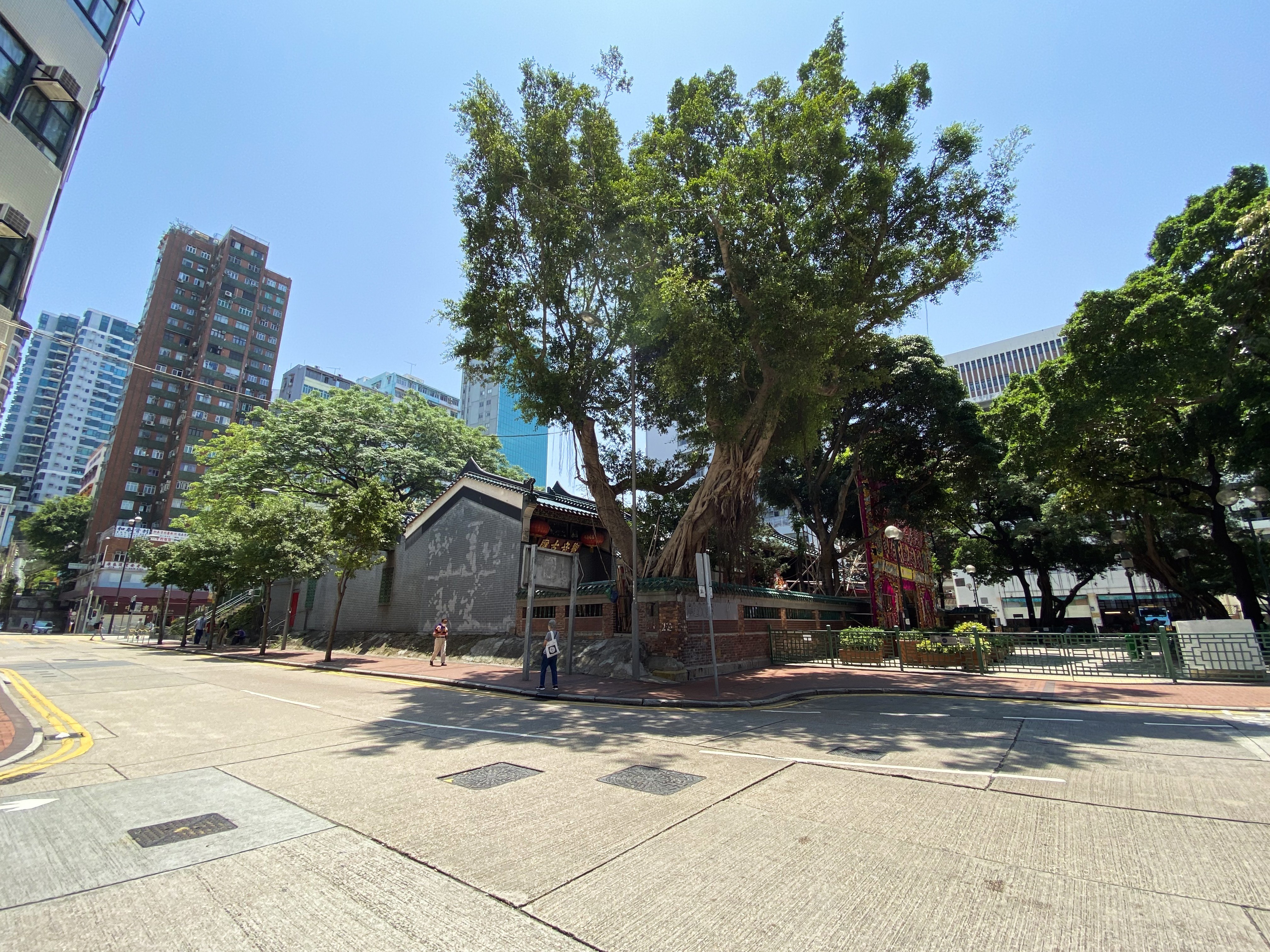 Tin Hau Temple Complex in Yau Ma Tei